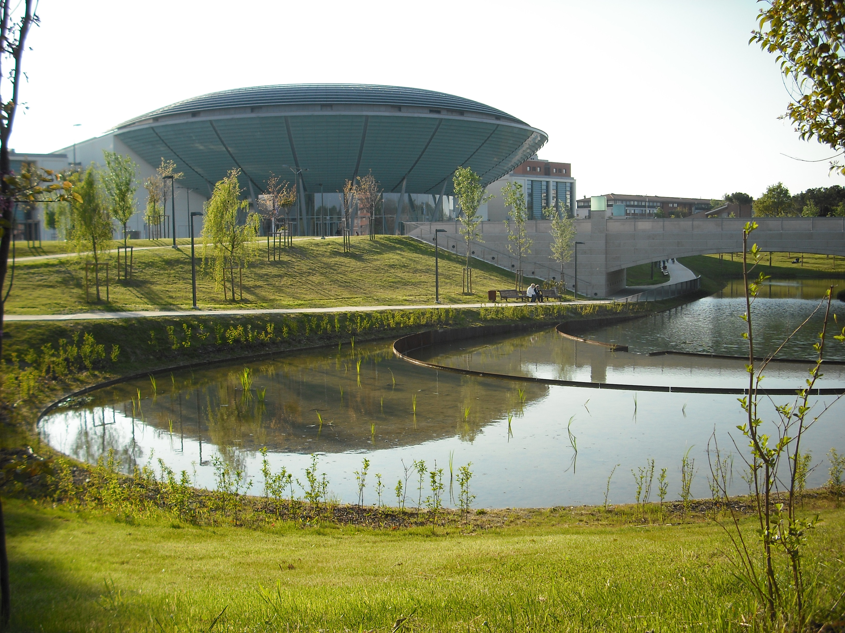 L'esterno del nuovo PalaCongressi di Rimini, situato in Via della Fiera.